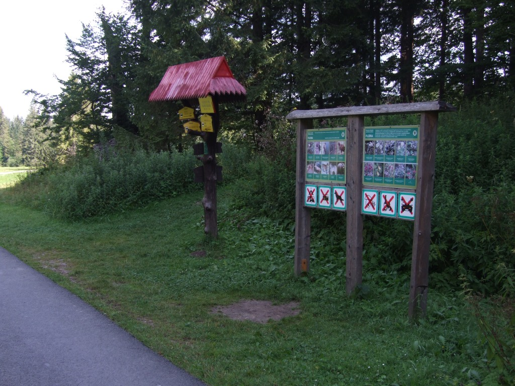 Polana i rozdroże Waniczka w Dolinie Bobrowieckiej Orawskiej